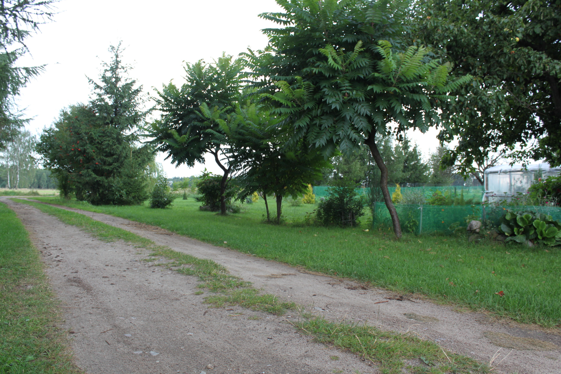 Zaporośle